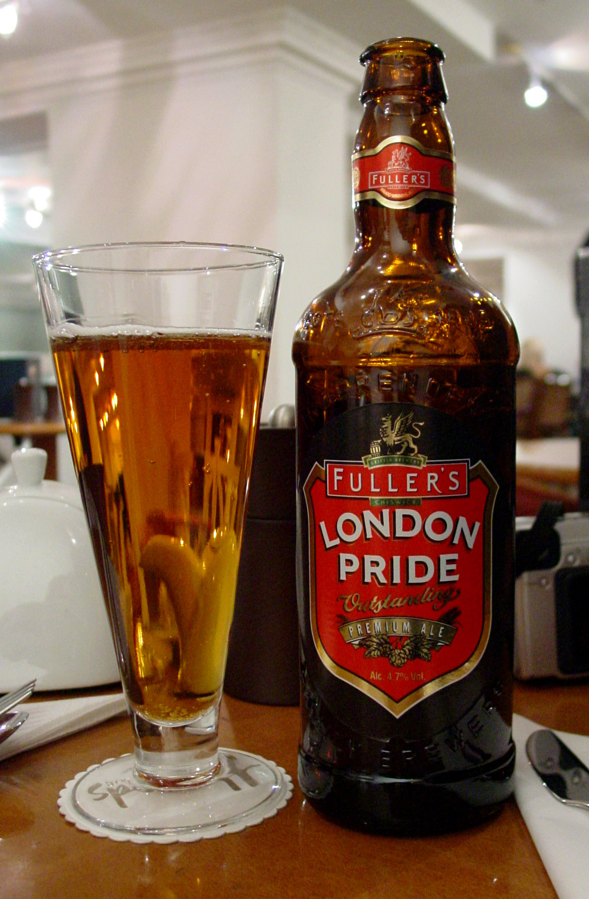 London Pride